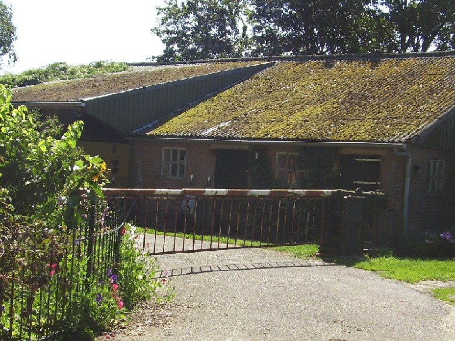 Voormalige halte Eikelhof, Nederland / the Netherlands